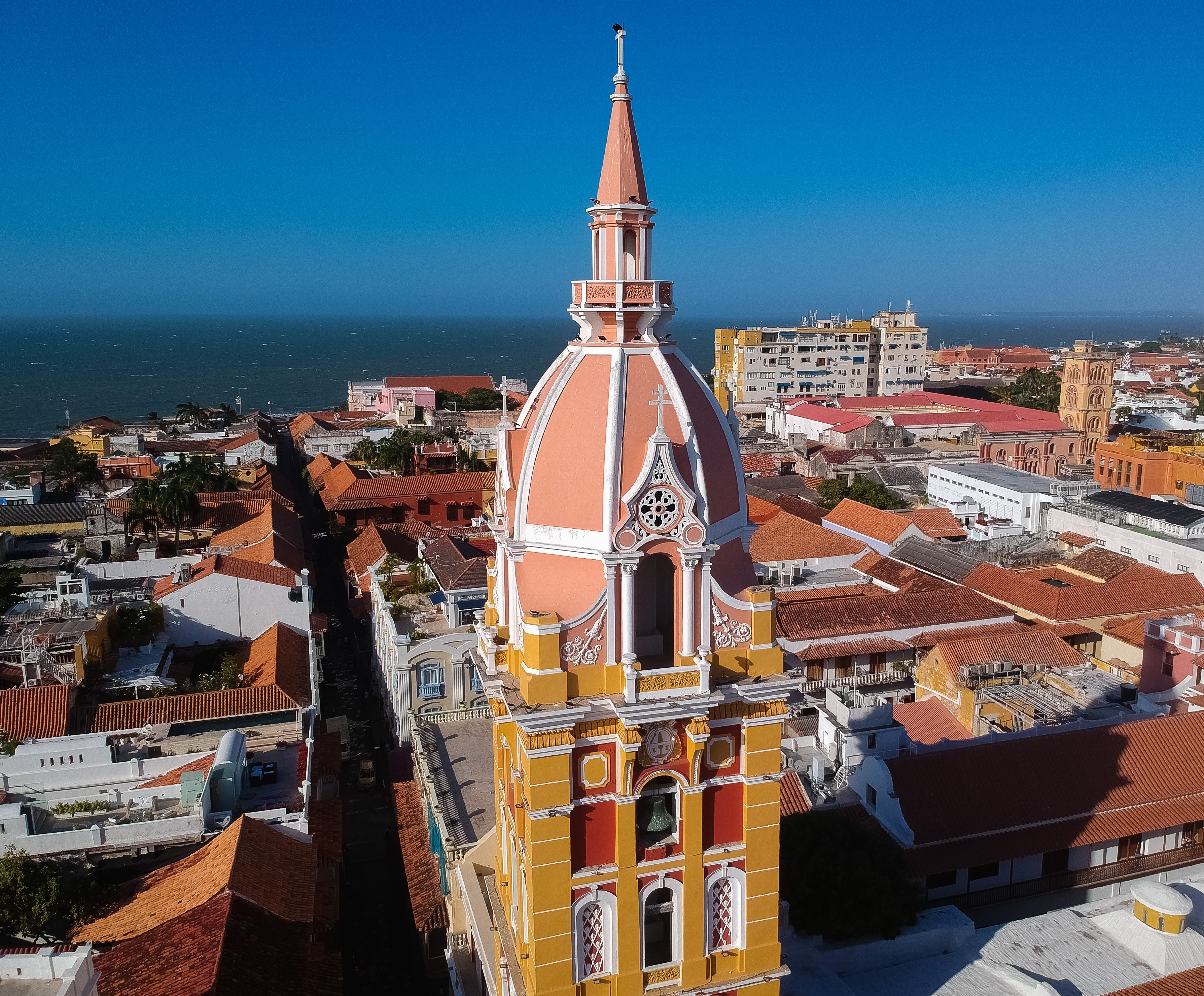 Foto desde el parque de Bolivar en el centro de Cartagena con vista a la catedral de Santa Catalina de Alejandría